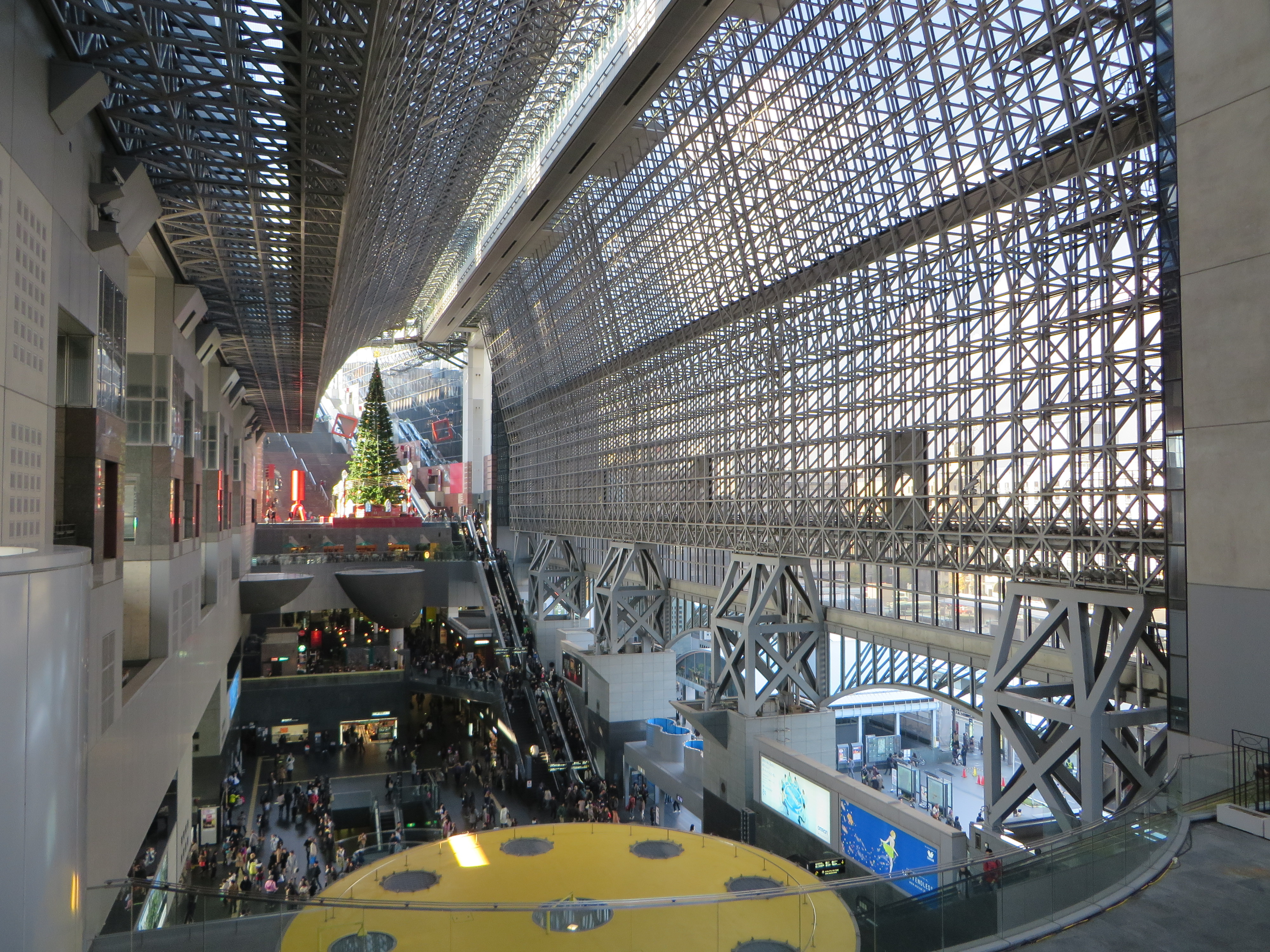 JR京都駅